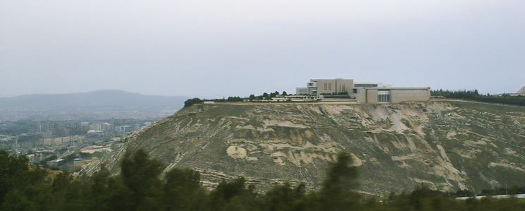 Palacio presidencial de Siria en 2005